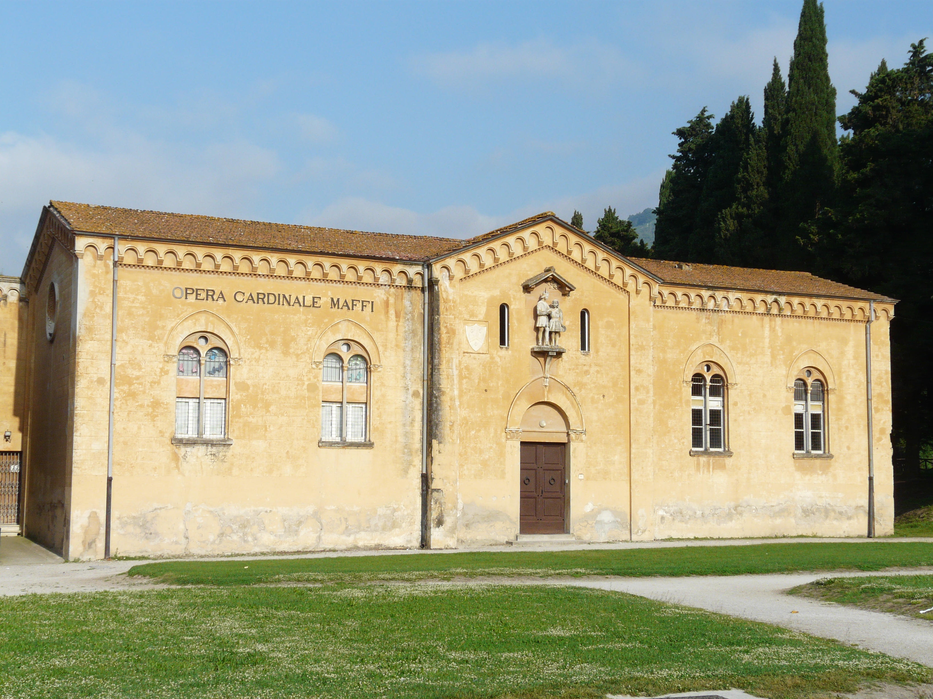 Opera Cardinale Maffi, Comune di Vicopisano, Toscana, Italia